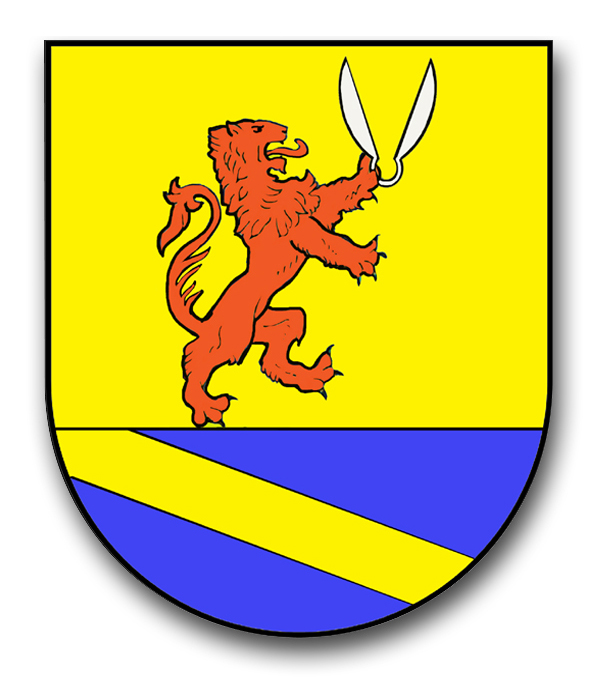 Brasão da família Sartori de Bassano del Grappa